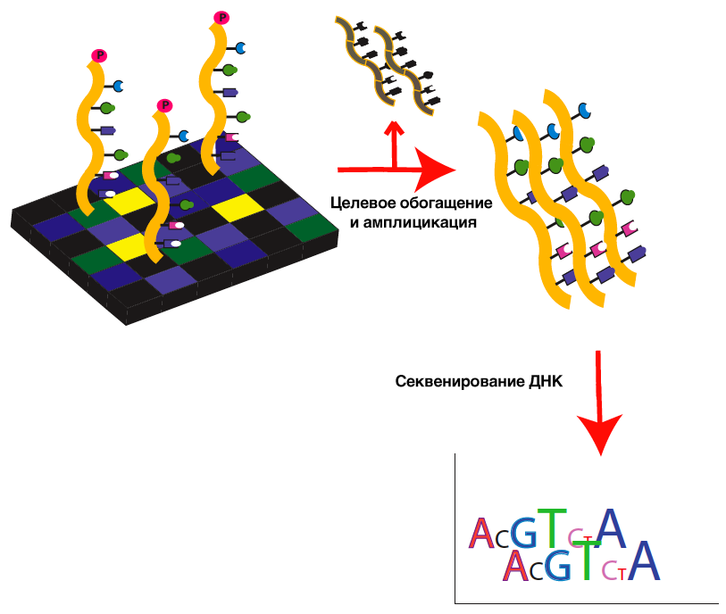 схема экзомного секвенирования с подписями на русском языке, часть 2